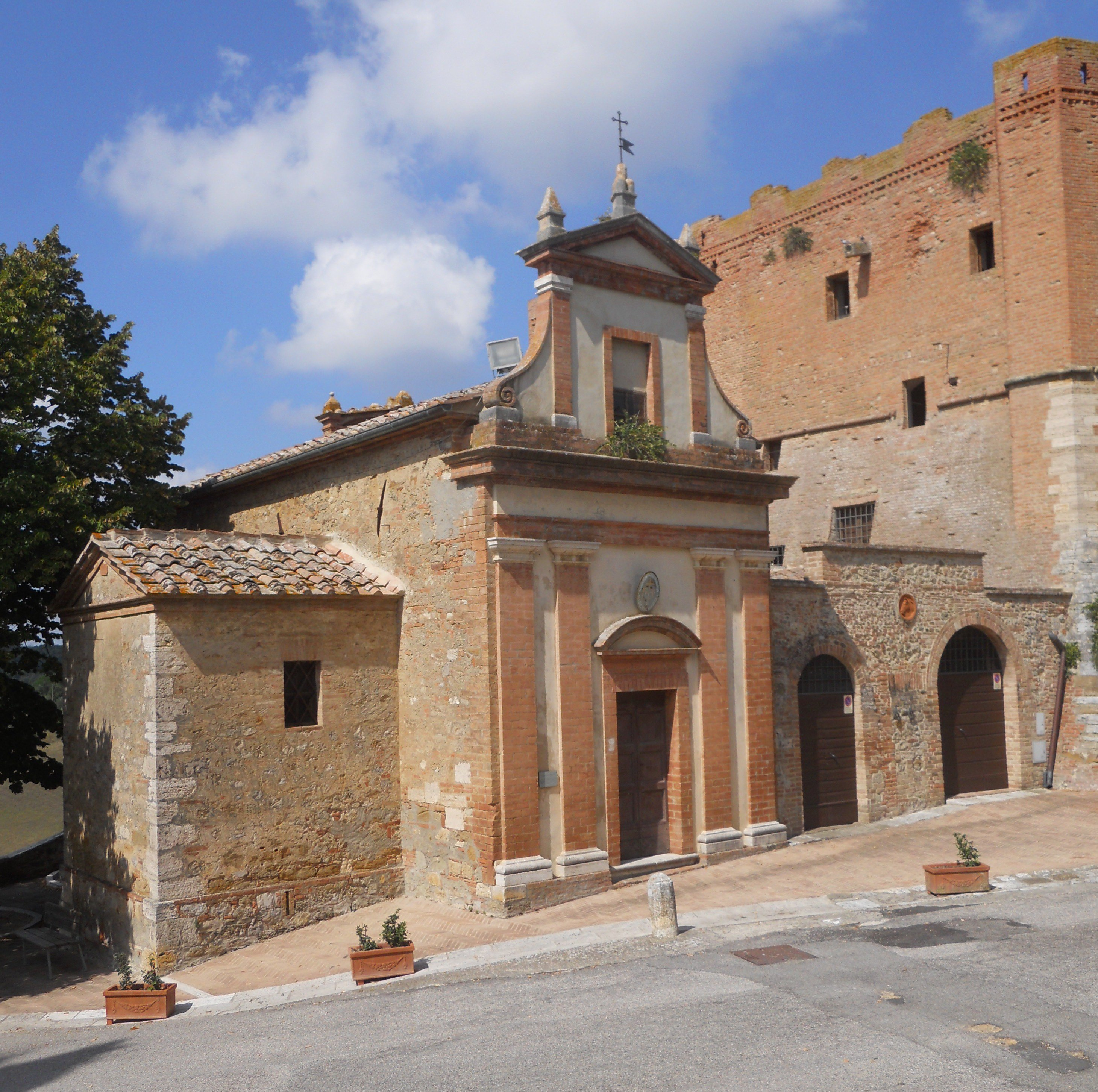 Esterno della chiesa di Sant'Antonio Abate, detta della Misericordia, in San Giovanni d'Asso.